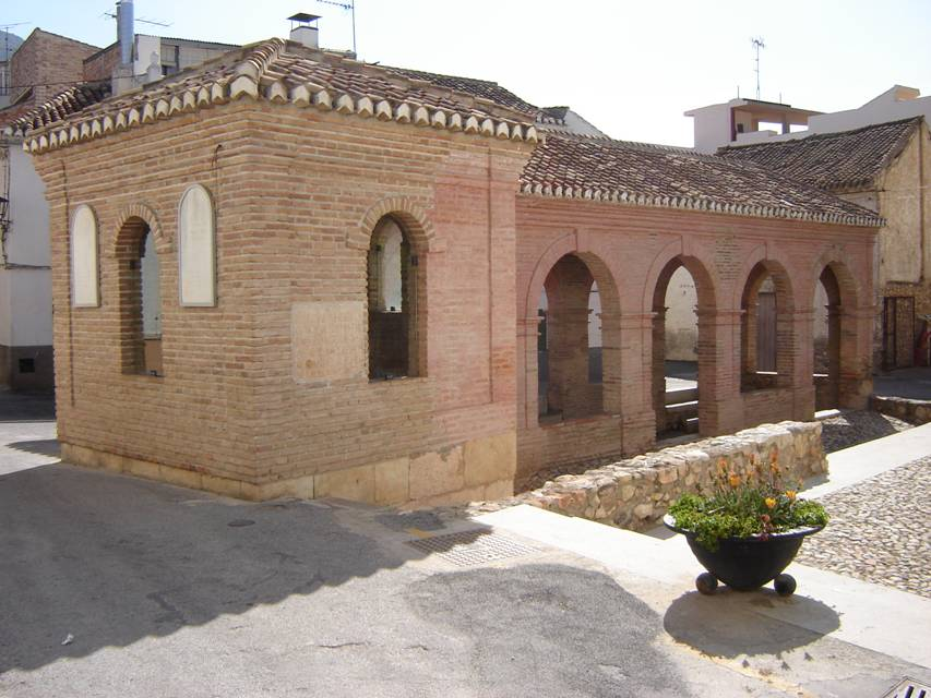 Lavadero y fuente de los cinco caños de El Padul (Granada, España)